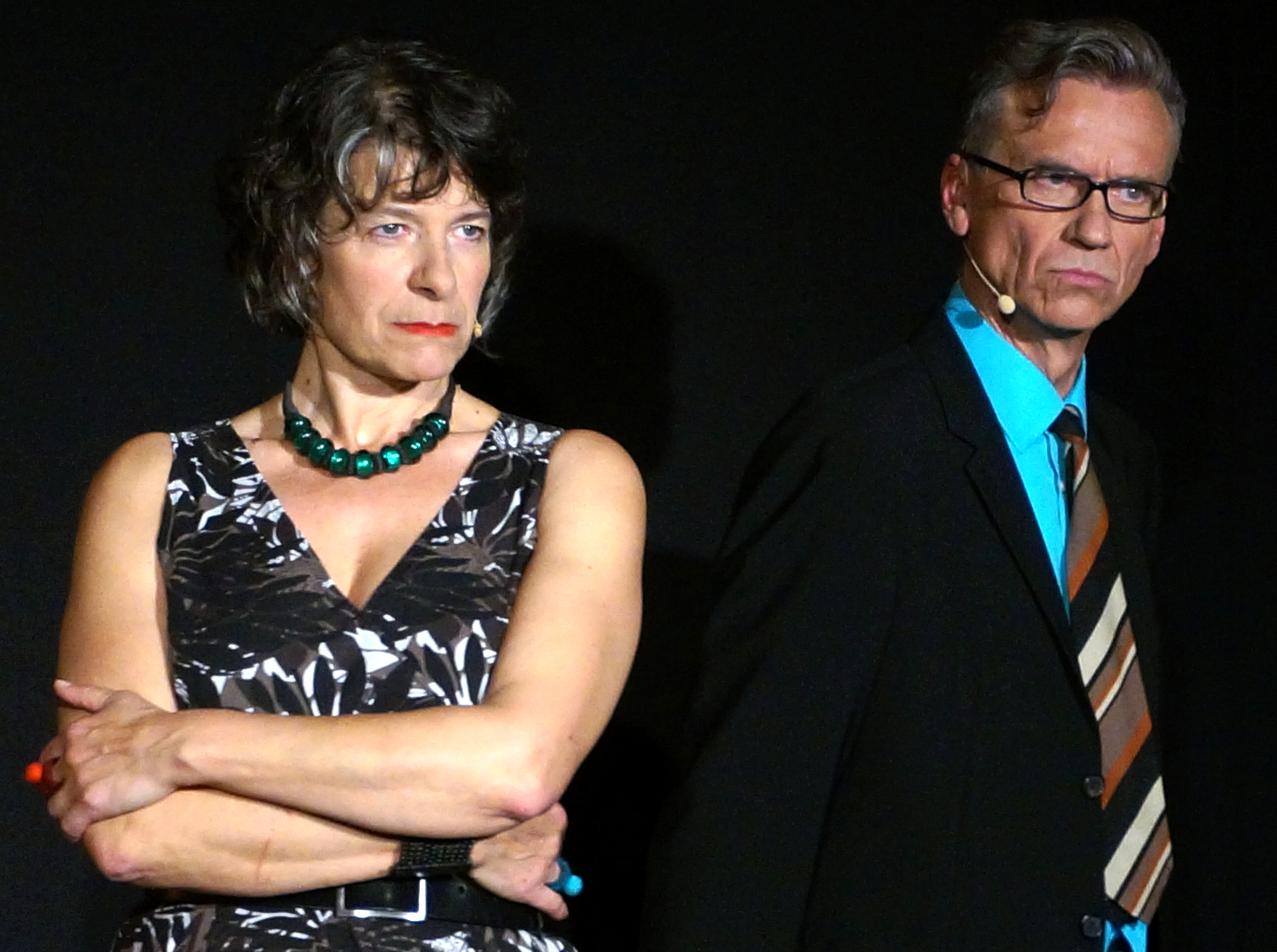 Das Künstlerpaar Silvana Prosperi und Thomas Prosperi (geb.Busse), das unter dem Namen Faltsch Wagoni auftritt, mit ihrem Programm Deutsch ist dada im April 2014 in Herrsching am Ammersee